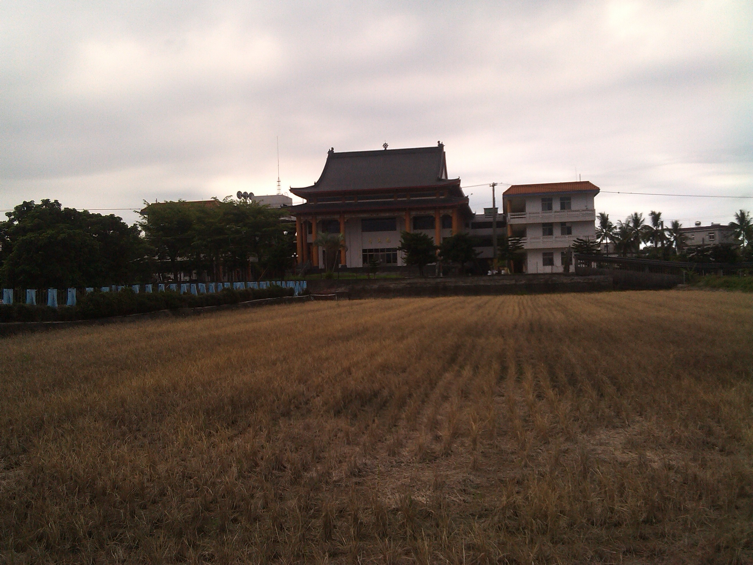 位於新園鄉北部(與萬丹鄉交界一帶) 鯉魚山旁